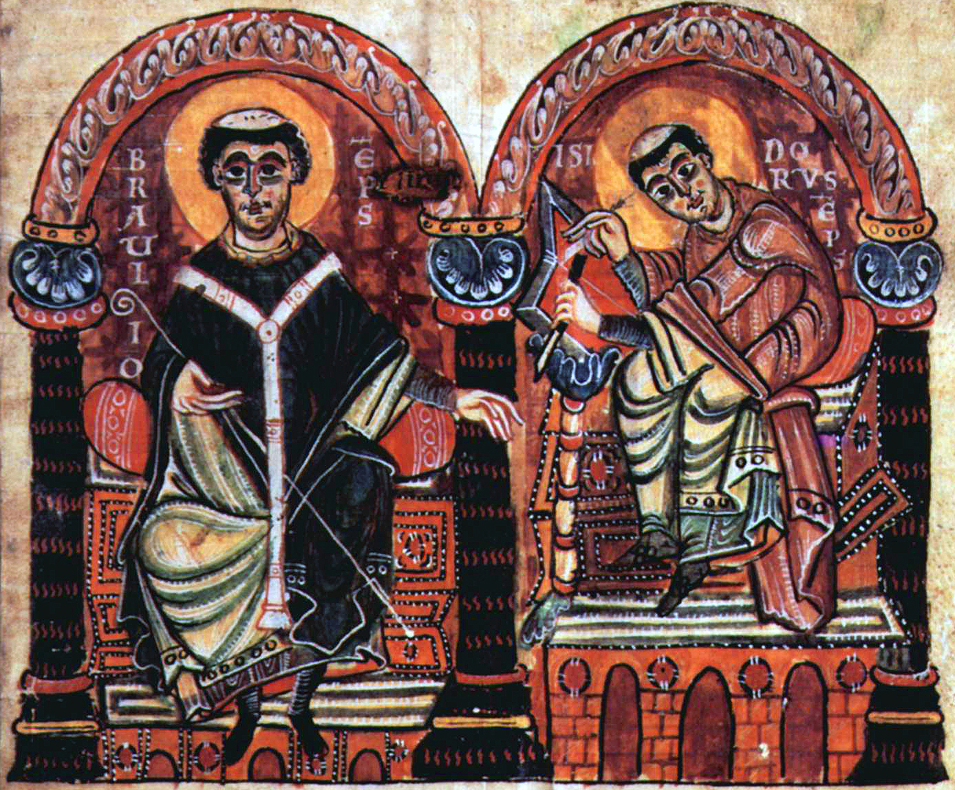 Maestro del Codex 167 Isidori libri originum. Imagen: Obispo Braulio de Zaragoza e Isidoro de Sevilla, segunda mitad del siglo X.